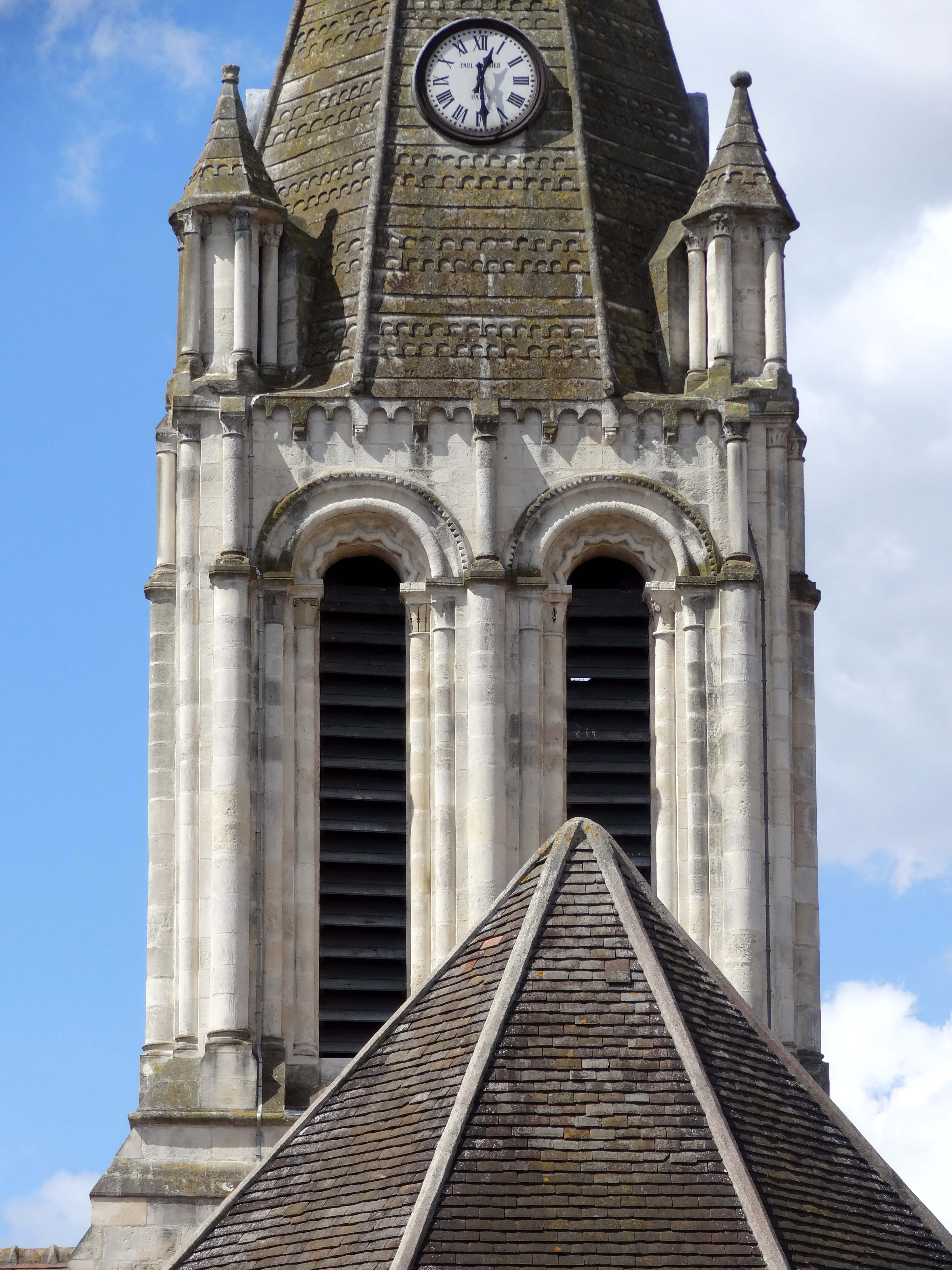 Église Saint-Maclou de Conflans-Sainte-Honorine - voir titre.